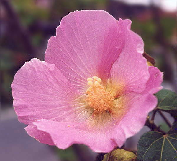 H. mutabilis pela tarde. Imagem gentilmente cedida pelo Sr. Marcos Capelini, do site sobre Malvaceae, em inglês e português